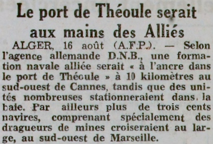 Extrait d'un article de journal du Le Petit Marocain" en date du 17 août 1944 évoquant le débarquement de Provence et la présence de navires alliés dans la baie de Théoule.